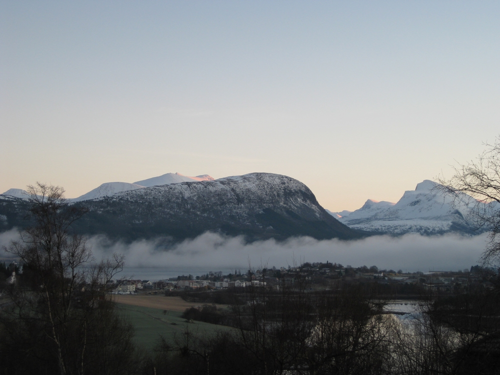 Vestnes sentrum med Helsetnakken og Hoemsfjellene i bakgrunnen, tatt fra Åsbygda.